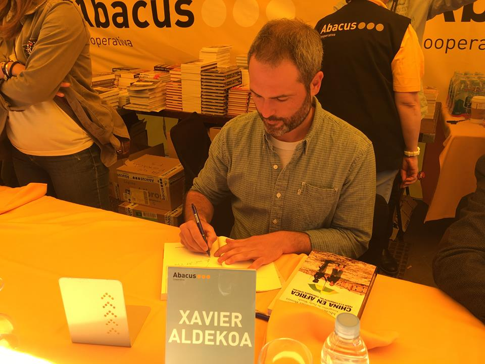 Xavier Aldekoa signant un exemplar del seu llibre Hijos del Nilo el Sant Jordi de 2017.